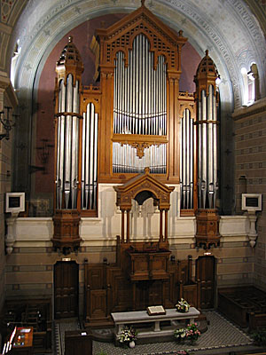 Orgue du Grand Temple de Lyon